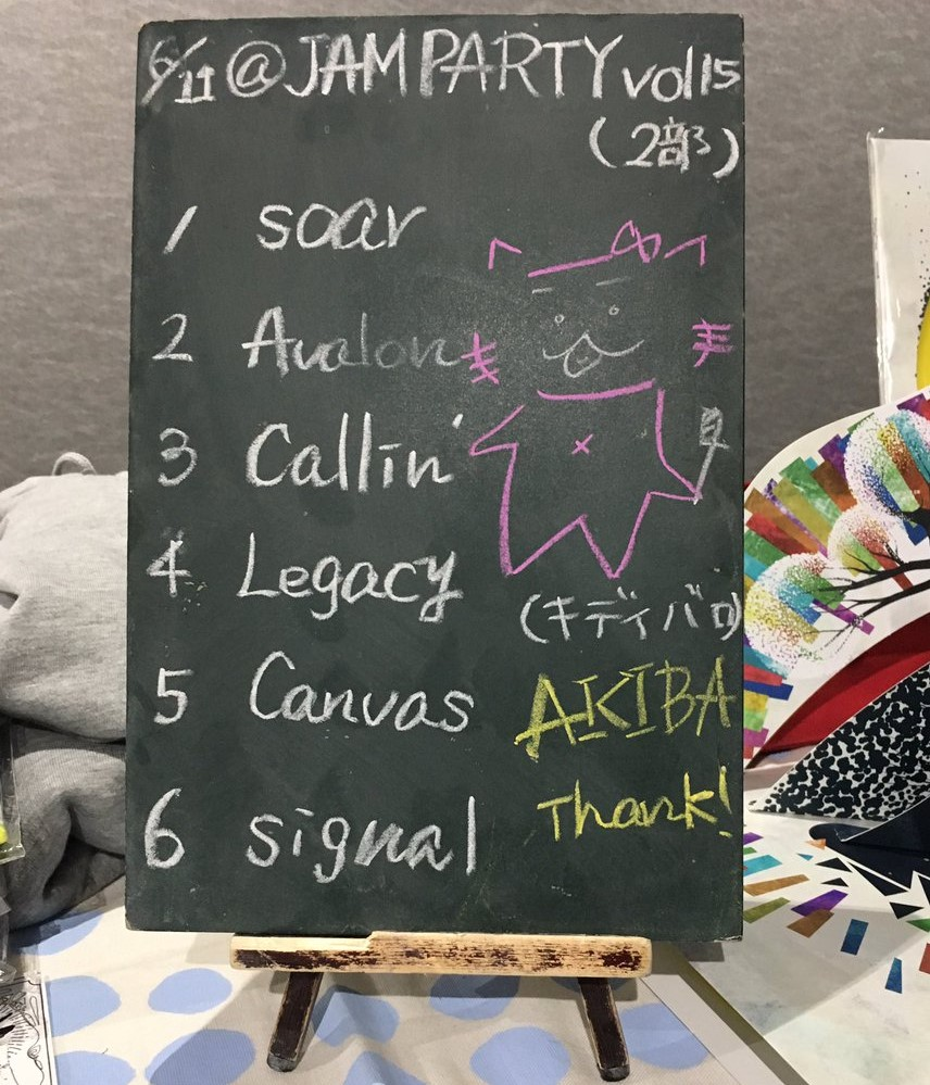 amiinAセトリボード(20170611(2))